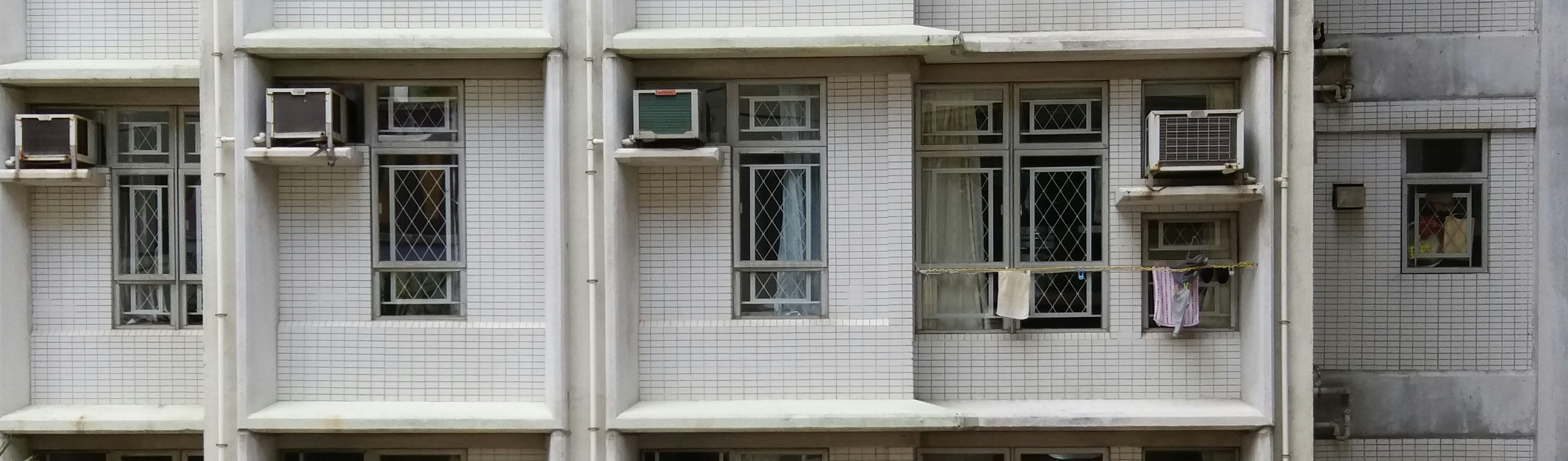 中文（香港）: 早期康和型大廈在入伙前已安裝窗花